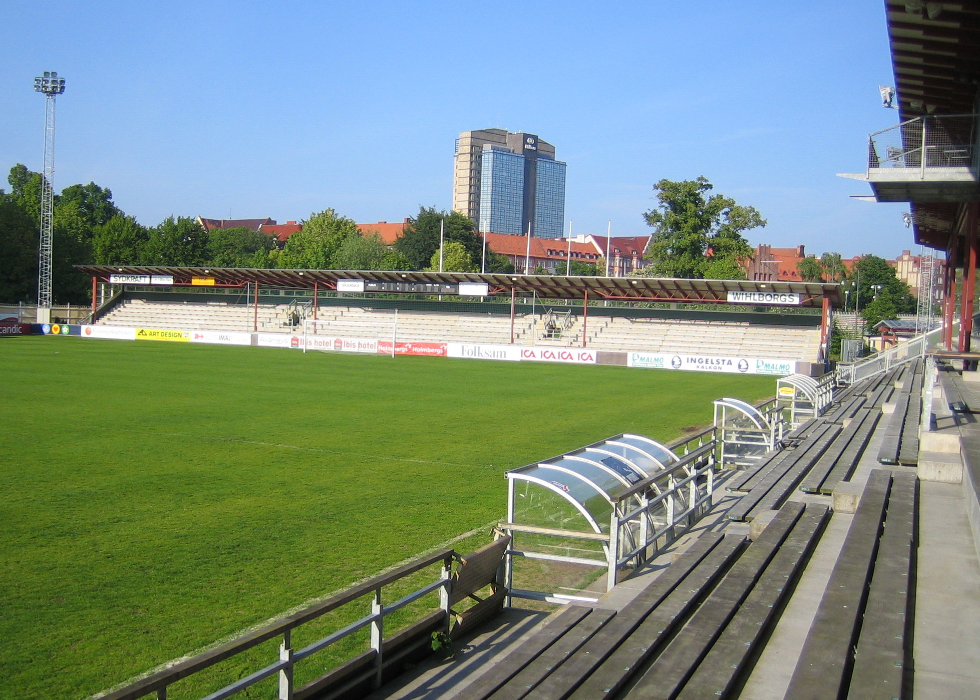 The old Sports Arena in Malmö, Malmö IP.